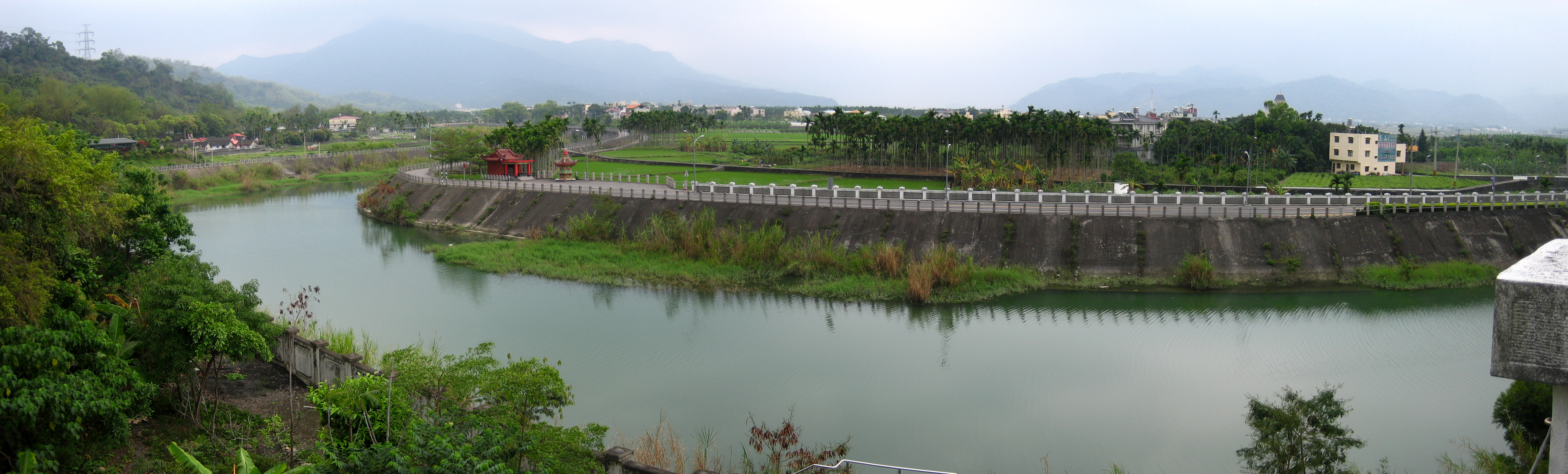 臺灣南投縣集集濁水溪